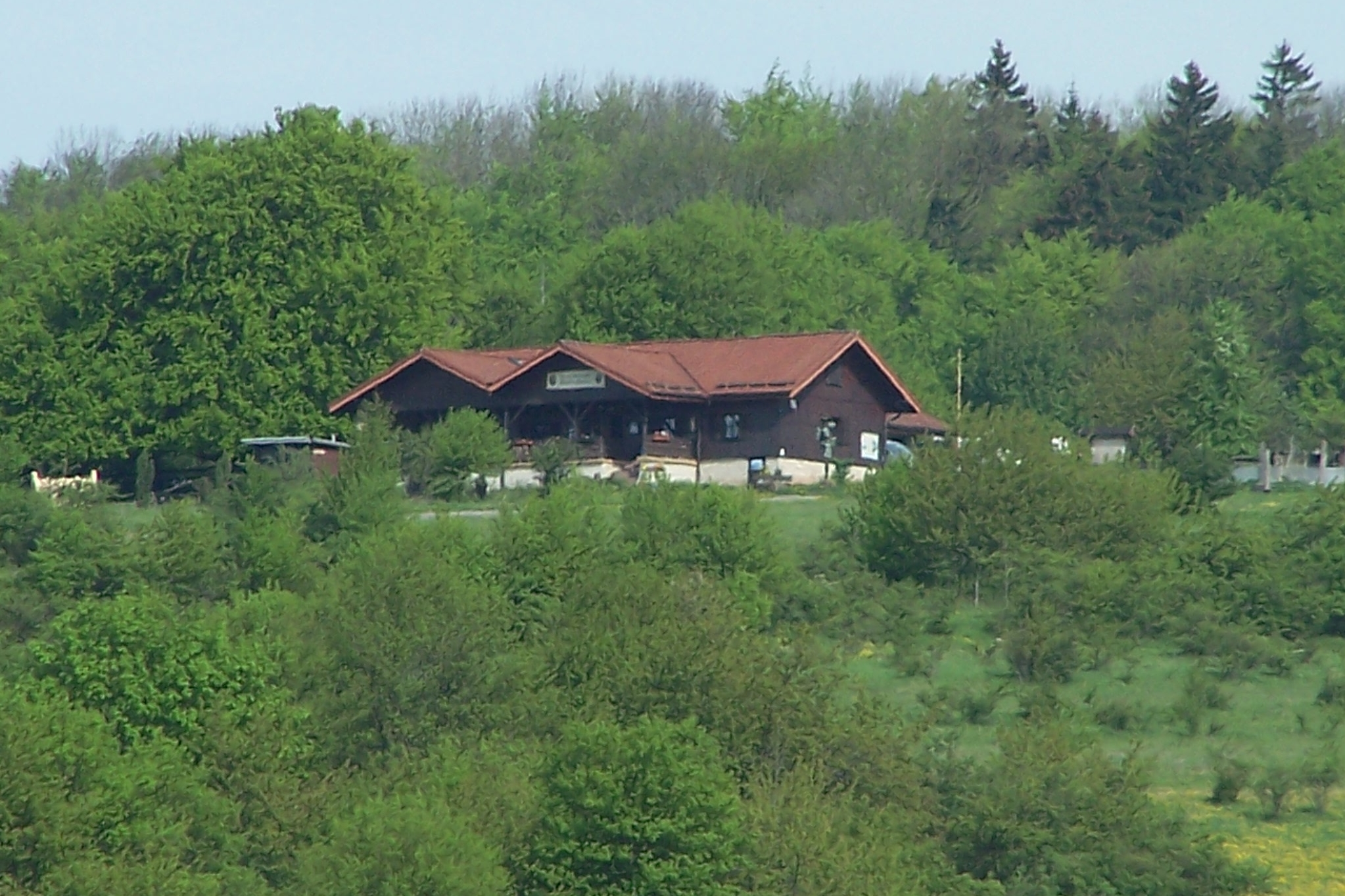 Blick zur Ausflugsgaststätte "Rhön-Brise" bei Kaltenlengsfeld am Weg zum Umpfen.